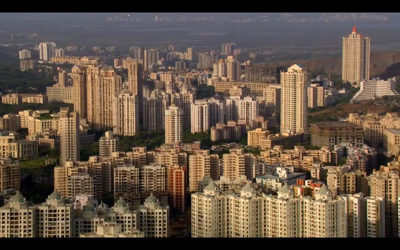 Maharashtra India